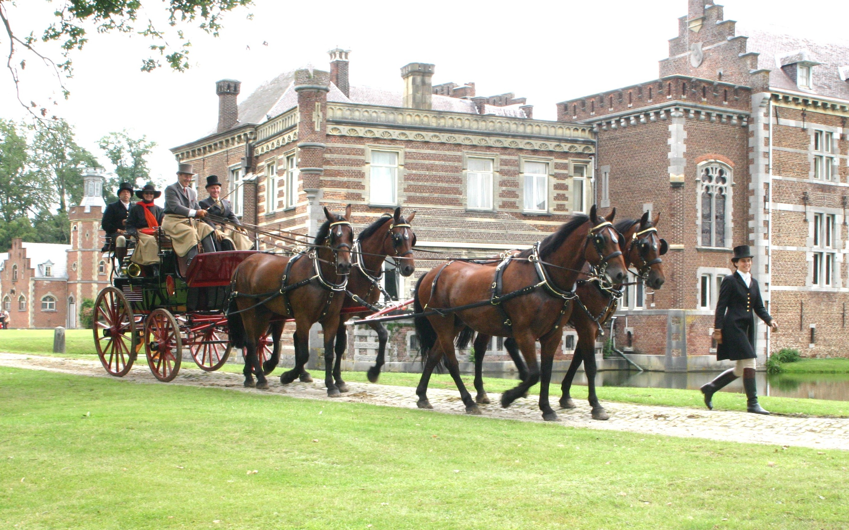 Roof Seat Break vum Paul Berens Véierspänner mat Cleveland Bay um Schlass Vogelsanck bei Zolder.